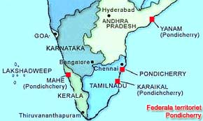 Pondicherry, Indien. Karta, egen tillv.